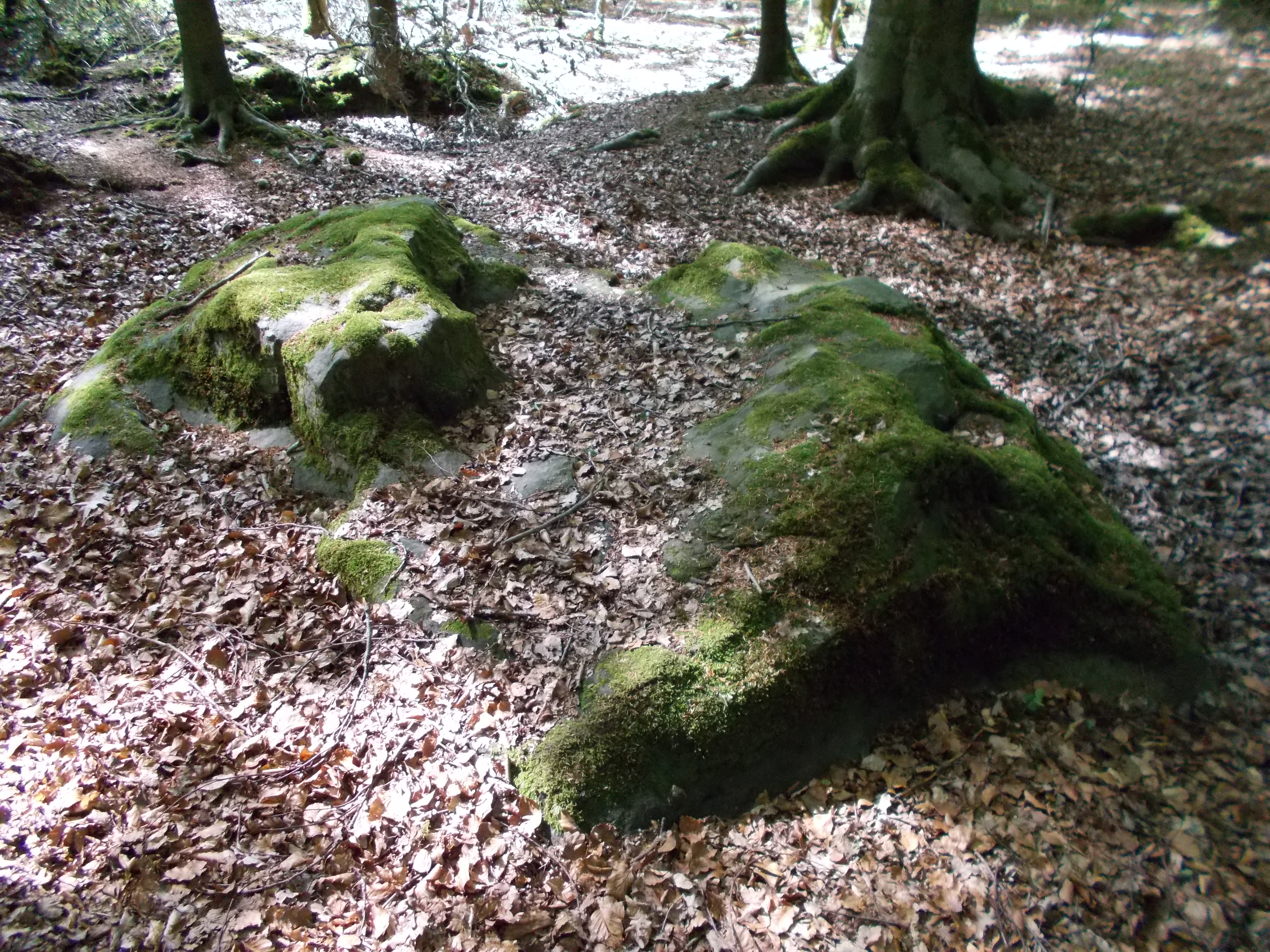 Naturdenkmal Teufelssteine am Teufelssteinweg im Hünxer Wald. ND 27, großer Teufelsstein mit Mulde. Maße: 360 x 210 x 80 cm.